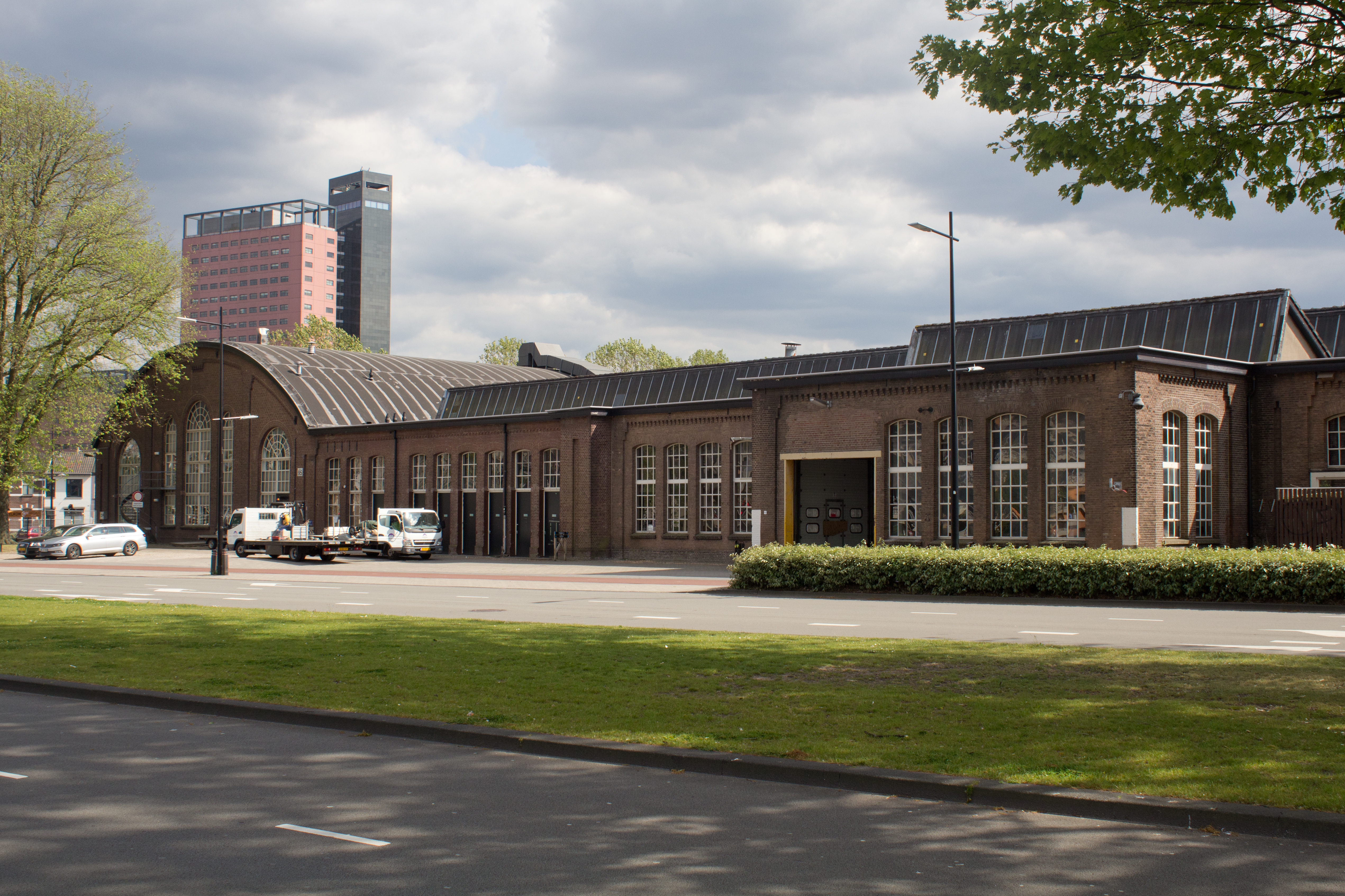 Voormalige koepelhal – Wagenmakerij (gebouwen 90,92 en 95) aan het NS-Plein te Tilburg